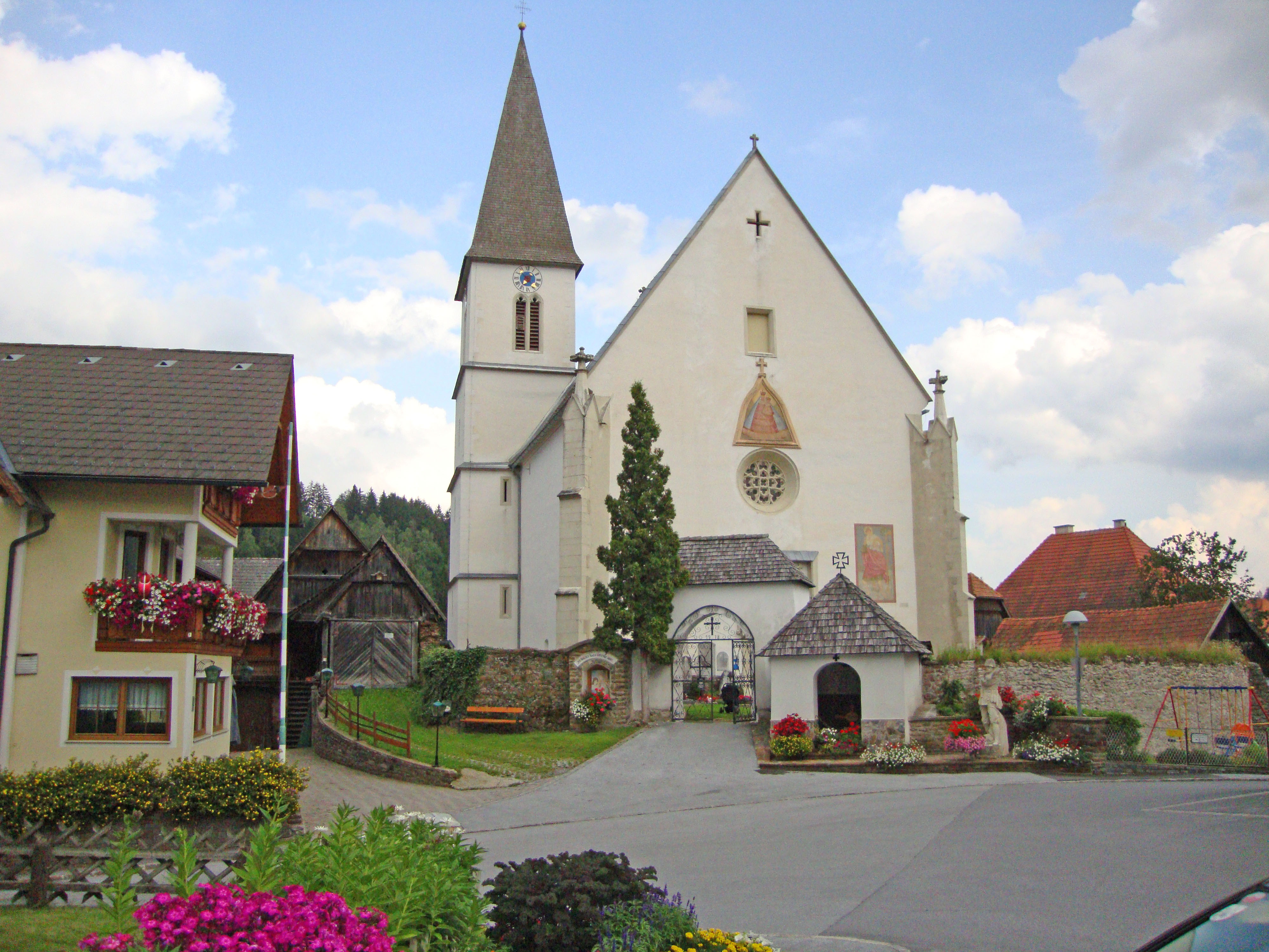 Kath. Pfarrkirche hl. Maria und Friedhof